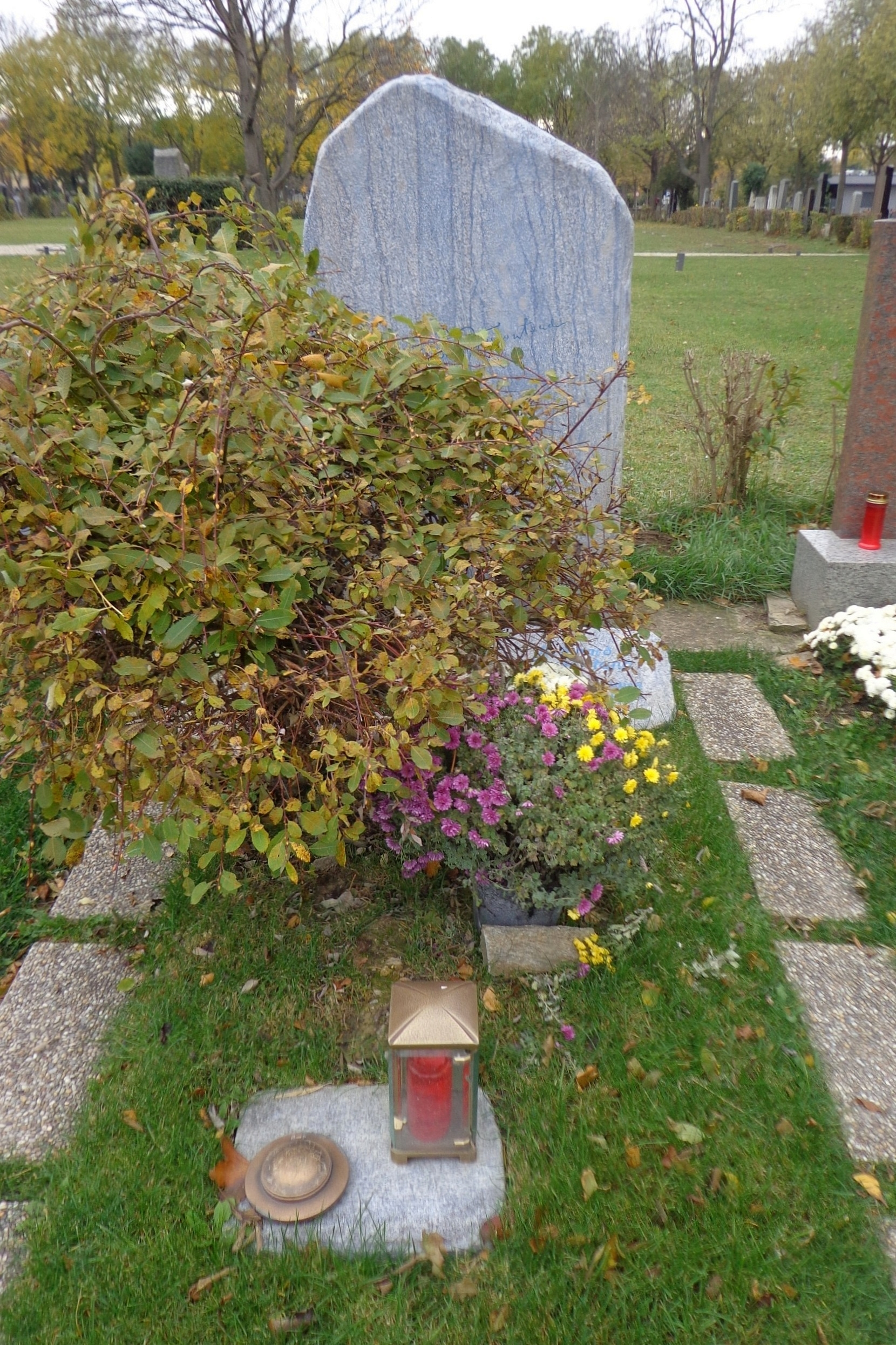 Wiener Zentralfriedhof - Gruppe 40: ehrenhalber gewidmetes Grab von Reinhard Tramontana